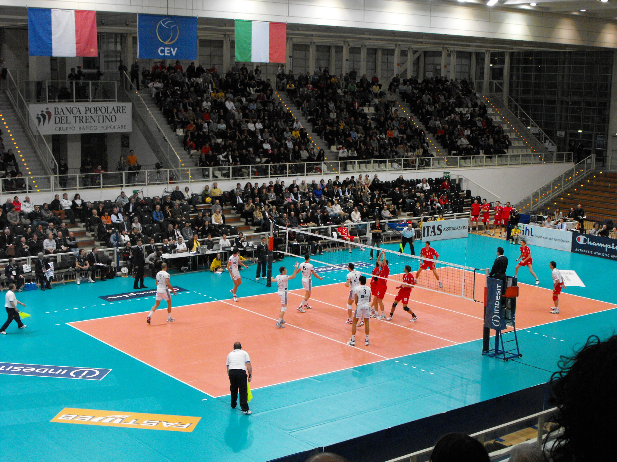 Trento-Beauvais, match of the first fase of CEV Champions League 2008-2009